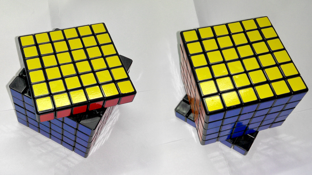 6x6魔術方塊轉動45度時的情形